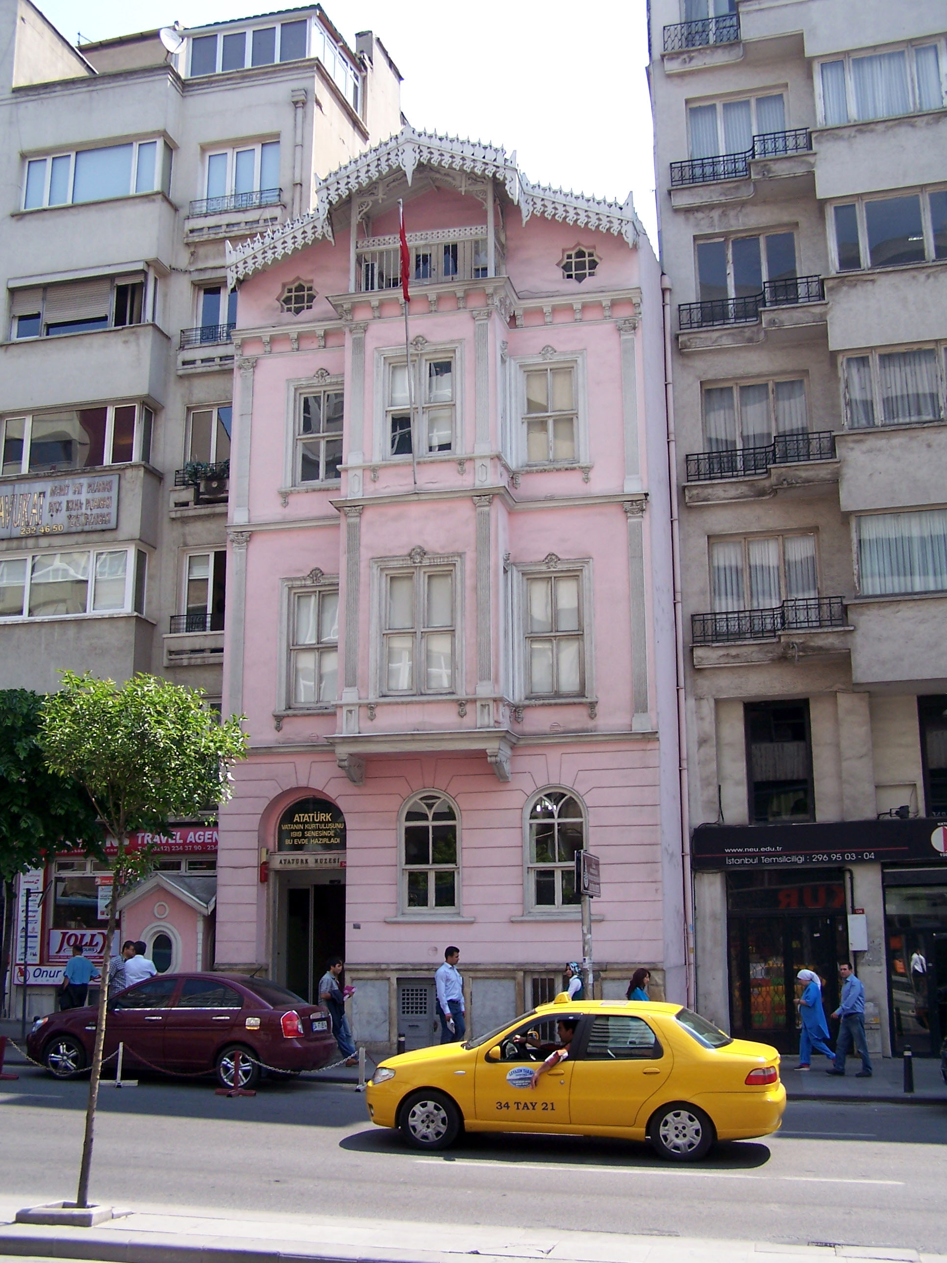 Atatürk Museum in Şişli, İstanbul, Turkey